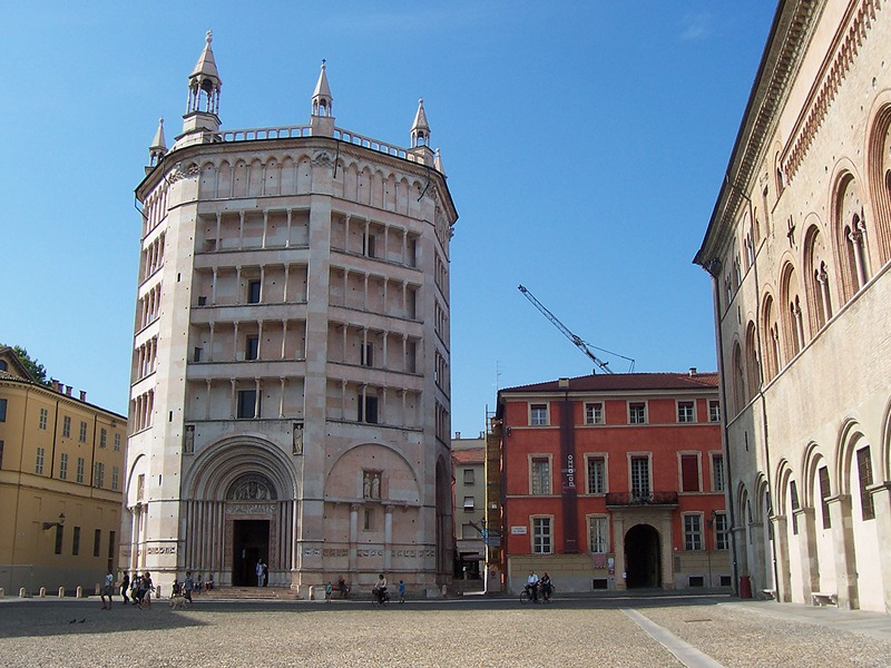 Parma - Battistero